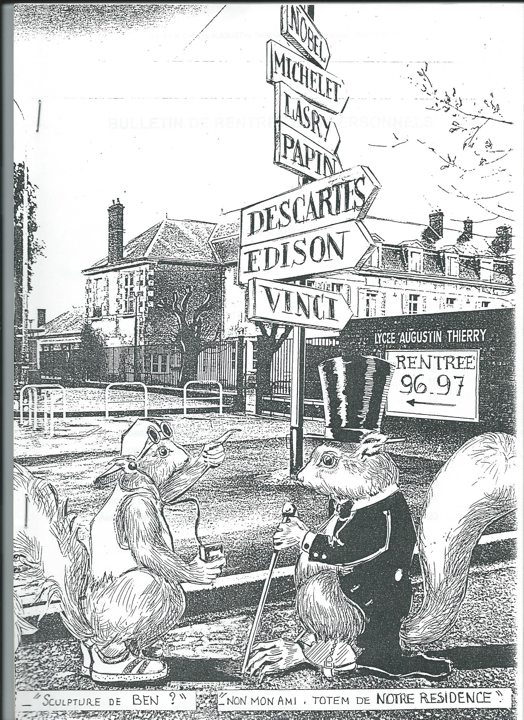 Une du livret de rentrée du collège-lycée Augustin-Thierry Rentrée 1996-1997 Auteur J. Marmande